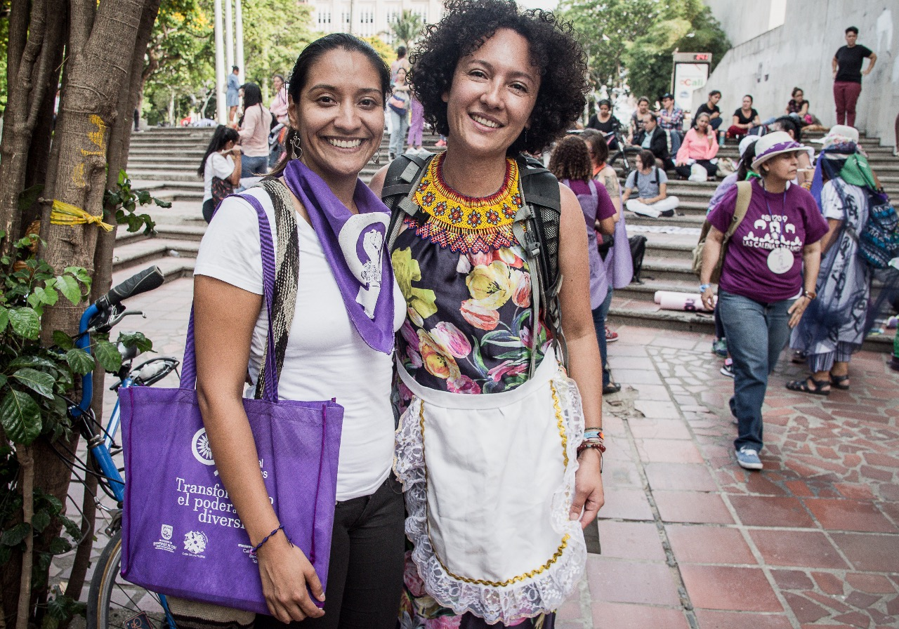 Isabel Zuleta de Ríos Vivos, contando vivencias y formando ciudadanías conscientes en compañía de Ana Erazo, destacada líder en Caleña